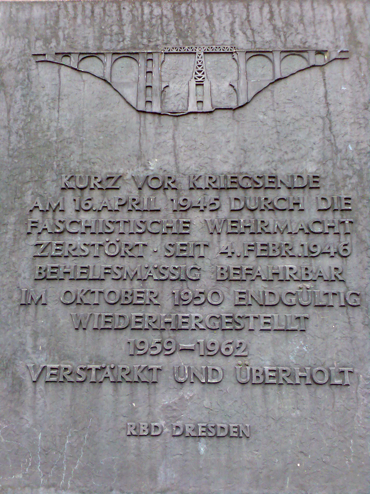 Dies ist eine der zwei an der Elstertalbrücke angebrachten Tafeln. Text: Kurz vor Kriegsendeam 16.April 1945 durch dieFaschistische Wehrmachtzerstört * Seit 4.Febr.1946behelfsmäßig befahrbarIm Oktober 1950 endgültigwiederhergestellt1959–1962verstärkt und überholtRBD Dresden